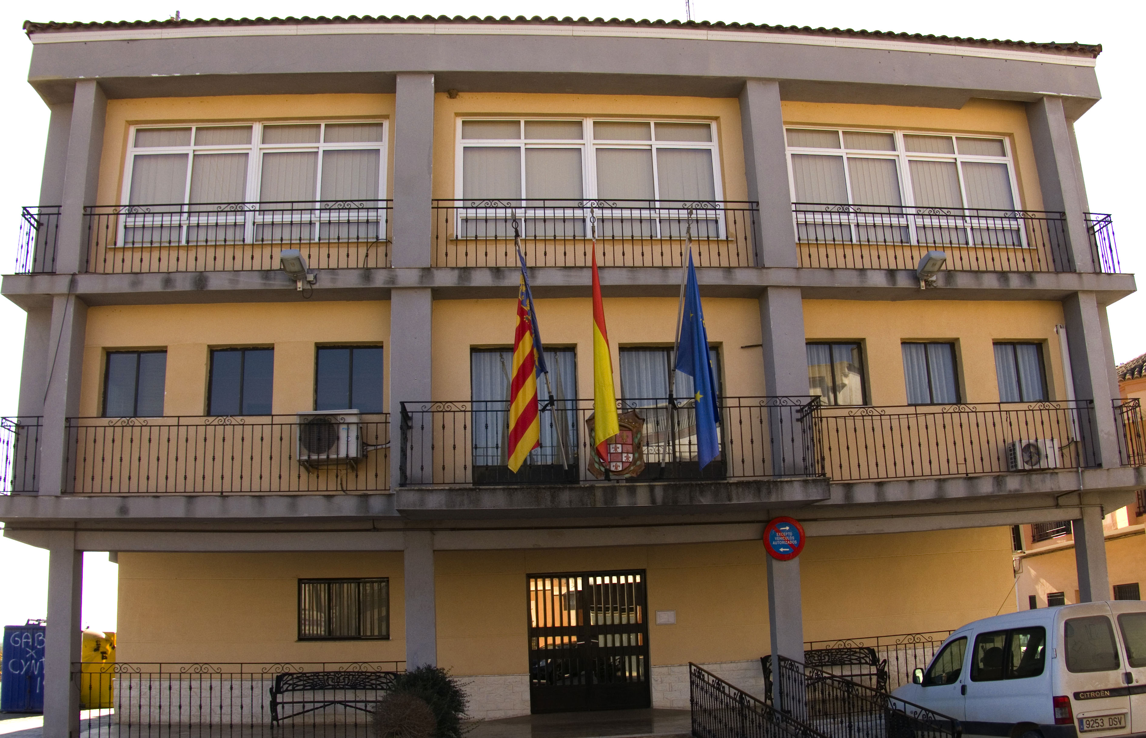 Poble situat a la comarca de la Ribera Alta